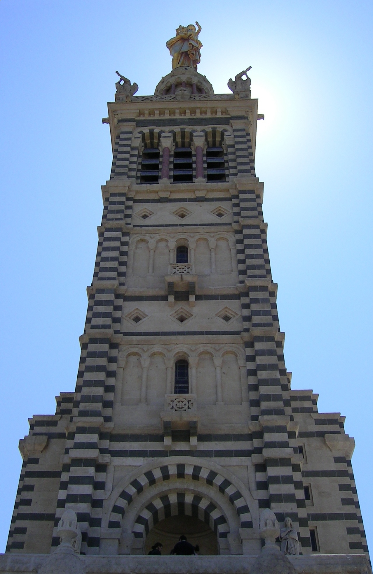 Description: Steeple of Notre-Dame de la Garde, Marseille, France. Source: own picture (Thomas Rosenau, User:Pumbaa80) Date: see metadata section below Description: Clocher de Notre-Dame de la Garde à Marseille. Source: Image prise par Thomas Rosenau (User:Pumbaa80) Date: voir ci-dessous (section «Metadata»)